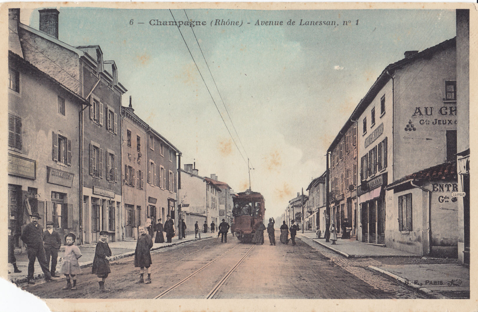 Carte postale ancienne éditée par BF à Paris, n°6 : CHAMPAGNE - Avenue de Lanessan, n°1